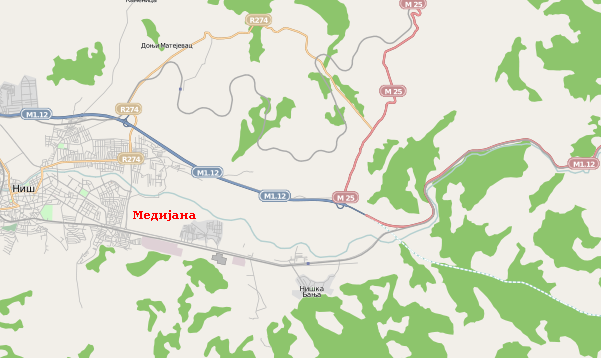 Mapa na kojoj je crvenim slovima označen položaj arheološkog nalazišta Medijana (Niš)